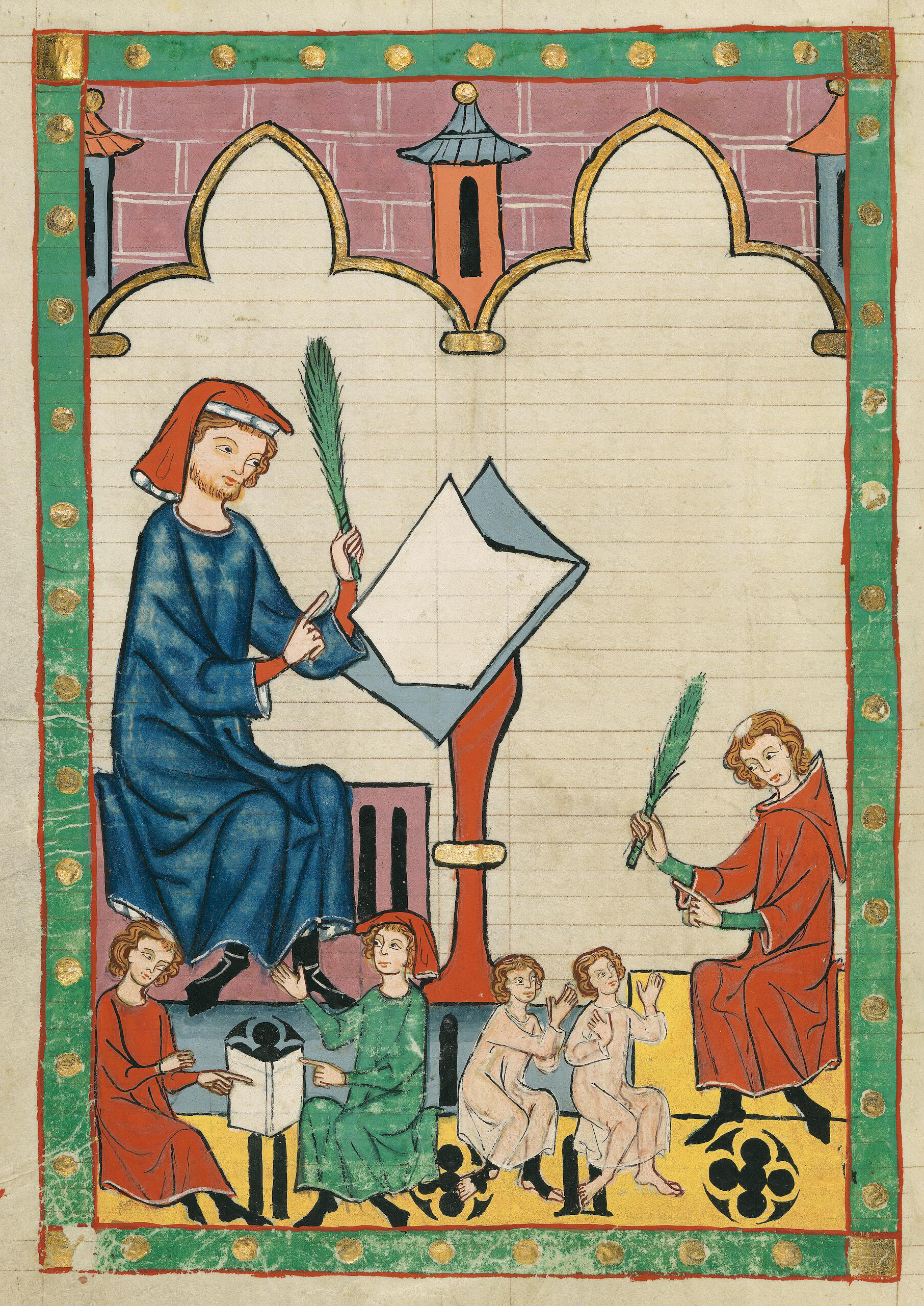 Codex Manesse, UB Heidelberg, Cod. Pal. germ. 848, fol. 292v, Der Schulmeister von Eßlingen